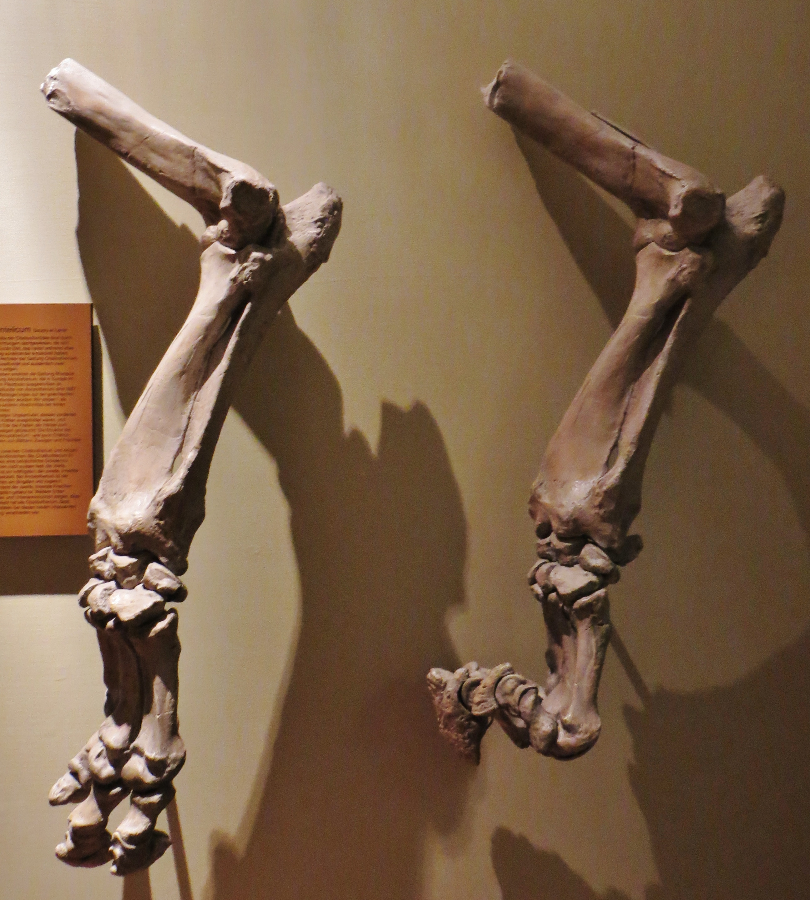 Fossil of chalicothere - Took the picture at Natural History Museum, Basel